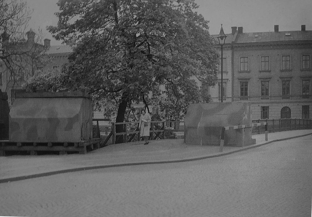 Slussgatan, vid Trädgårdsföreningen i Göteborg sommaren 1945. Fasta och rörliga spärrblock av cement, så kallade pianoblock, har förberetts för att spärra av bron över vallgraven.